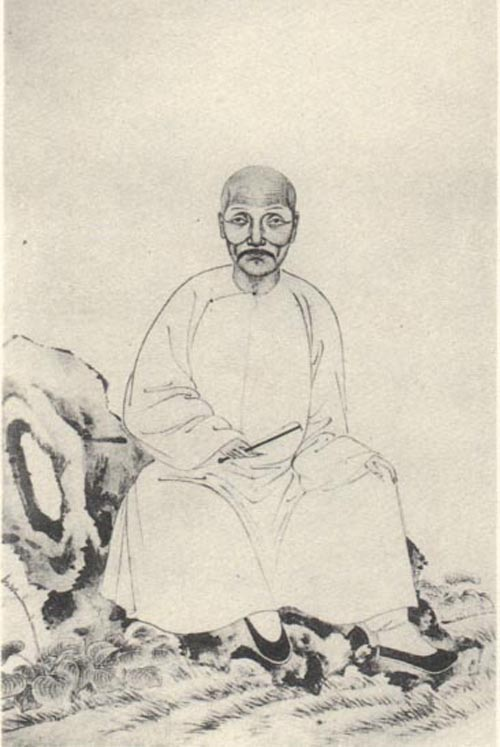 清代学者。